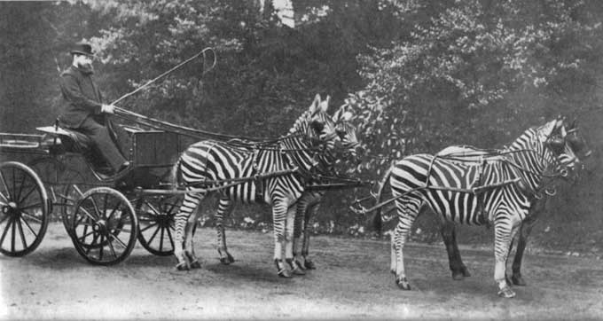 L'anglais Lionel Walter Rothschild avec son attelage de zèbres.